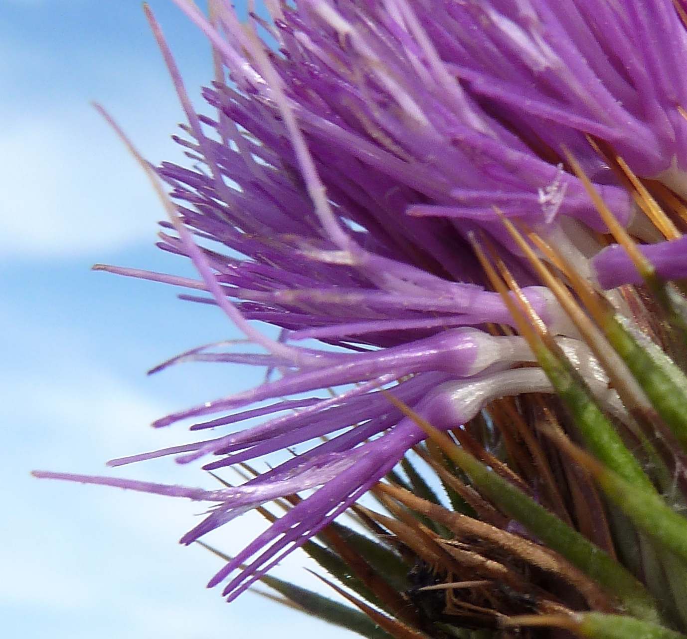 Onopordum acanthium var. acanthium - Detalle de los flósculos de tubo blanco y corola de 5 largos lóbulos lineales purpuráceos, bulbosa en su base . - Circa Estación de Contenedores de RENFE/ADIF de Abroñigal/Embajadores, Madrid (España).